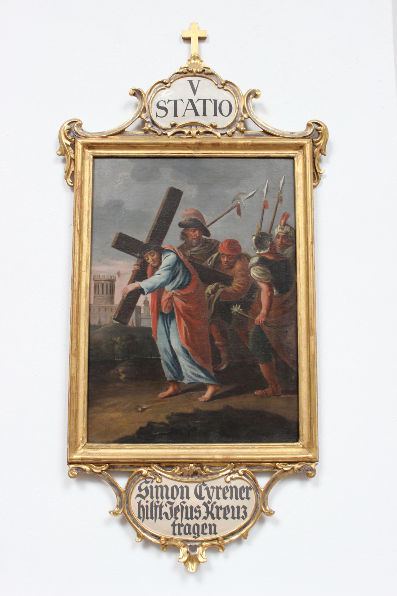 5. Station des Kreuzwegs der Heidelberger Jesuitenkirche